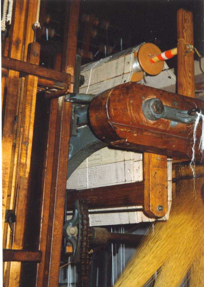 Die Lochkartensteuerung einer Jacquard-Maschine im Historischen Zentrum Wuppertal